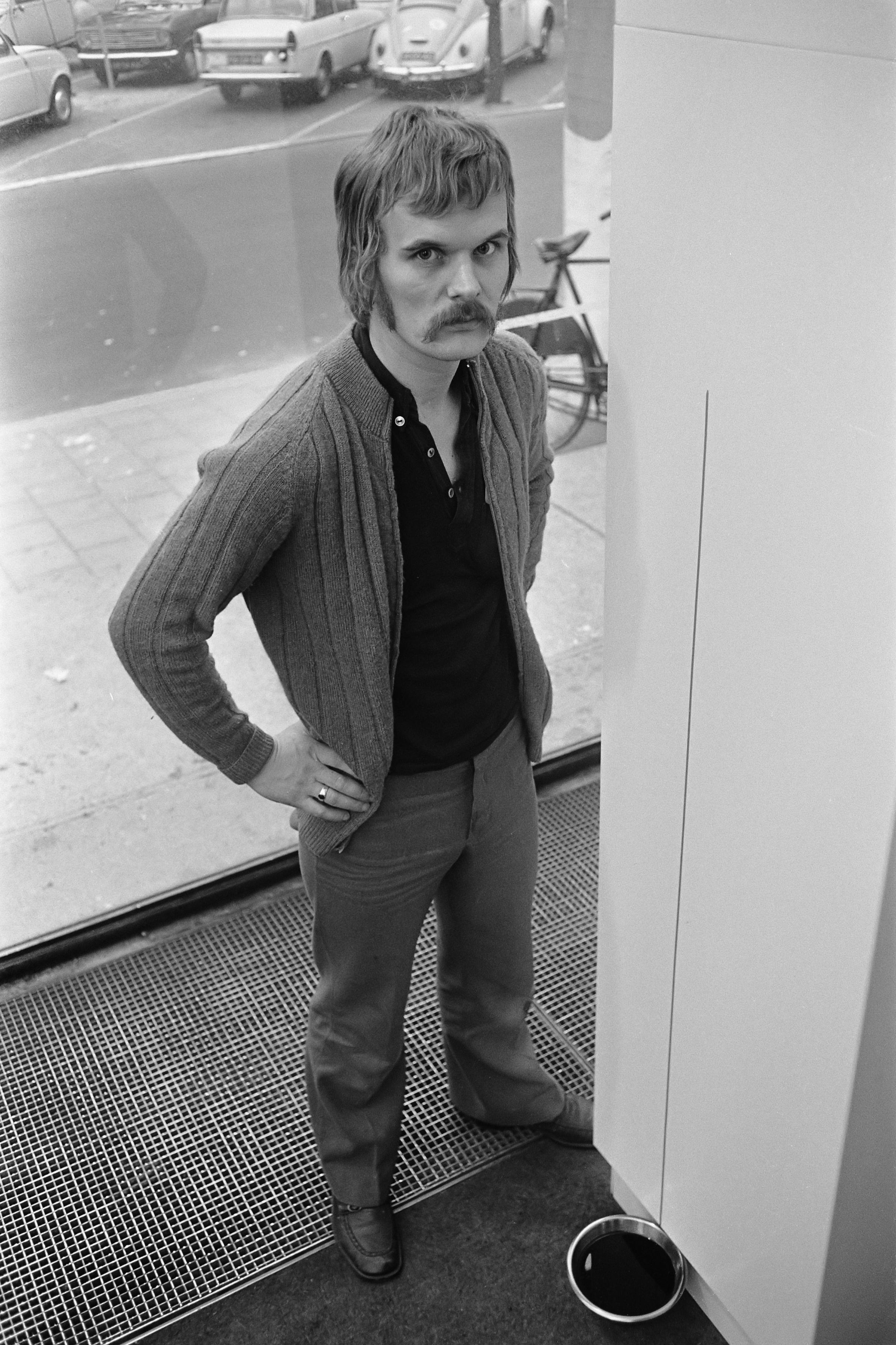 Tentoonstelling van werken van Jan van Munster in Stedelijk Museum Amsterdam. Jan van Munster bij een va zijn werken 12 december 1969